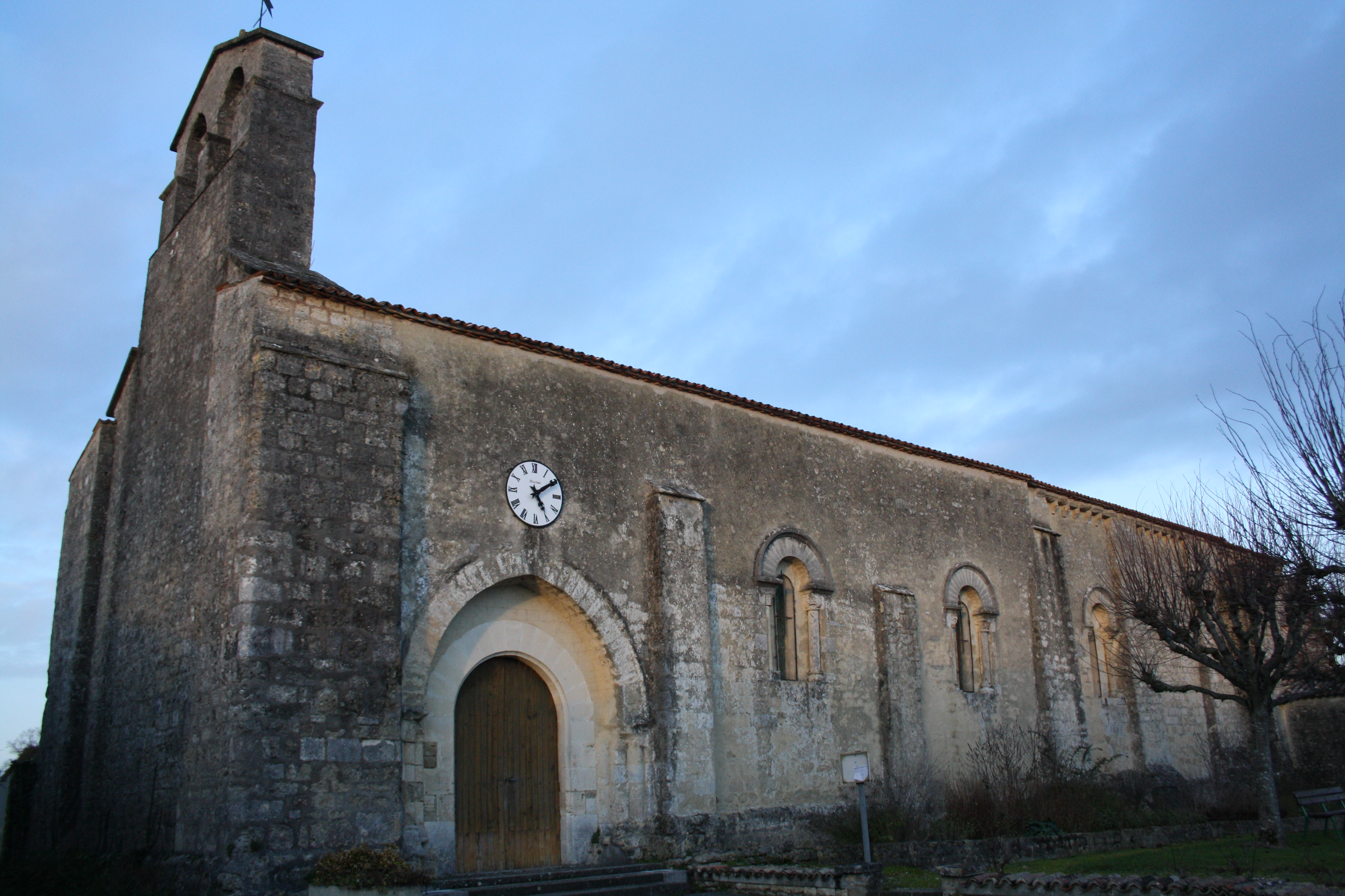 Eglise Saint-Nazaire à Bernay, commune de Bernay-Saint-Martin (Charente-Maritime, France).